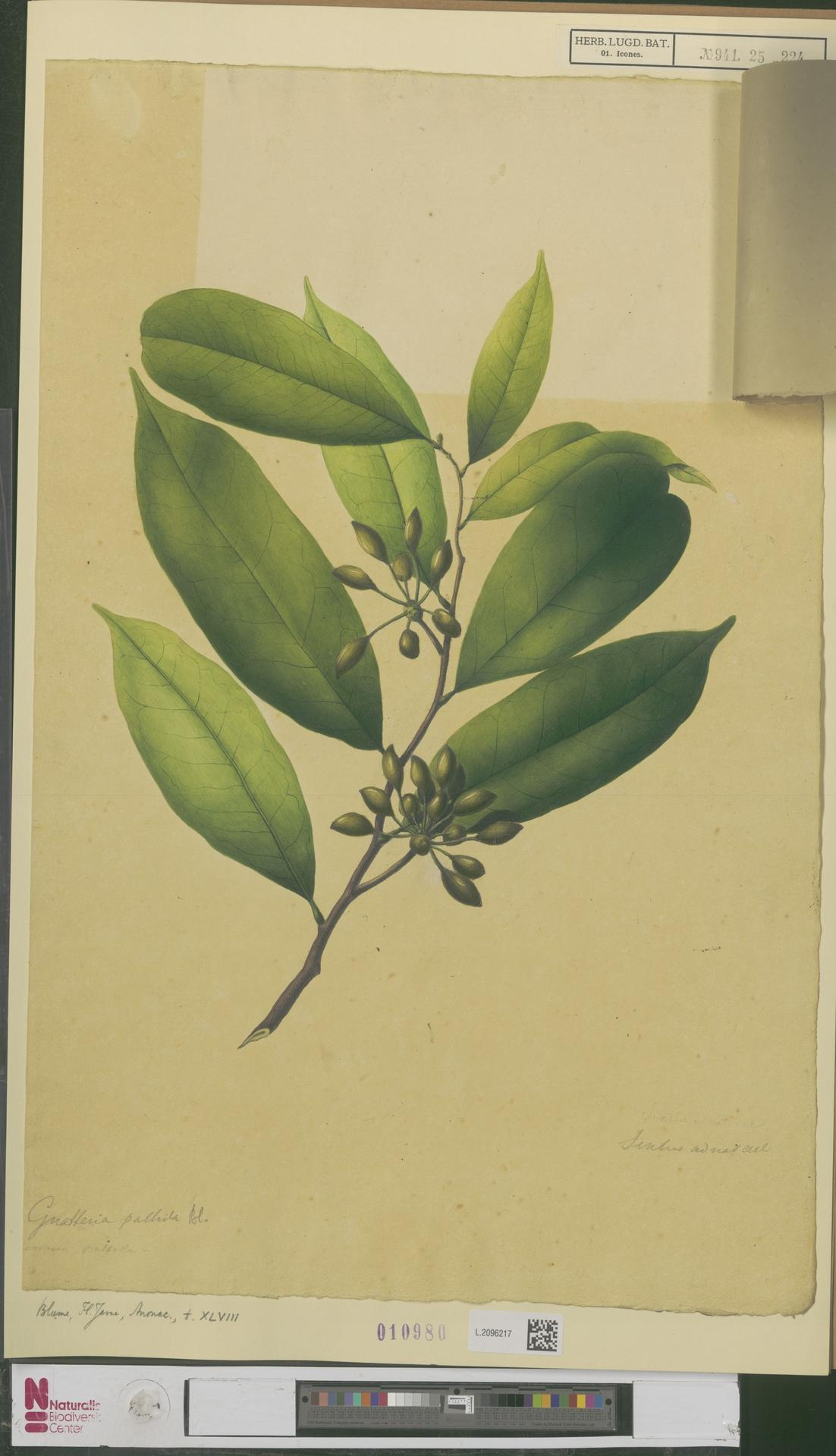 Guatteria pallida Blume